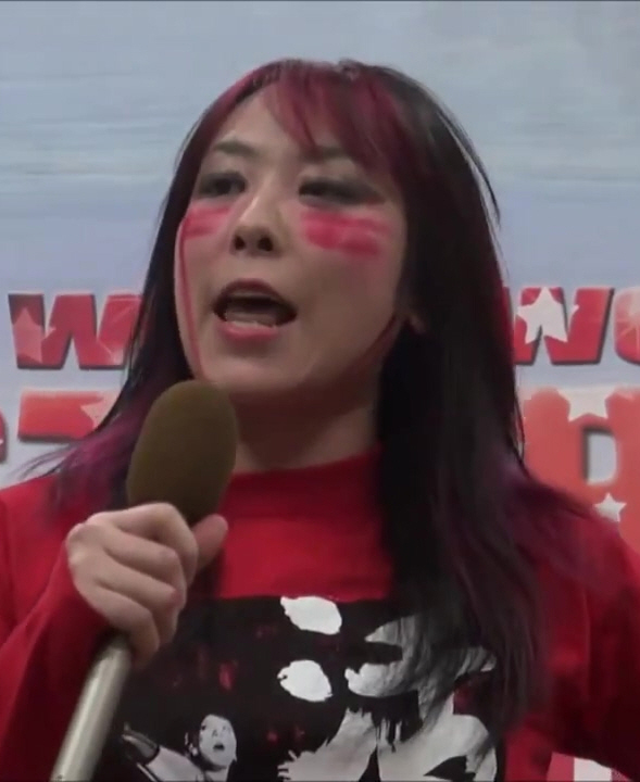 2014年12月2日 12・23後楽園ホール大会記者会見